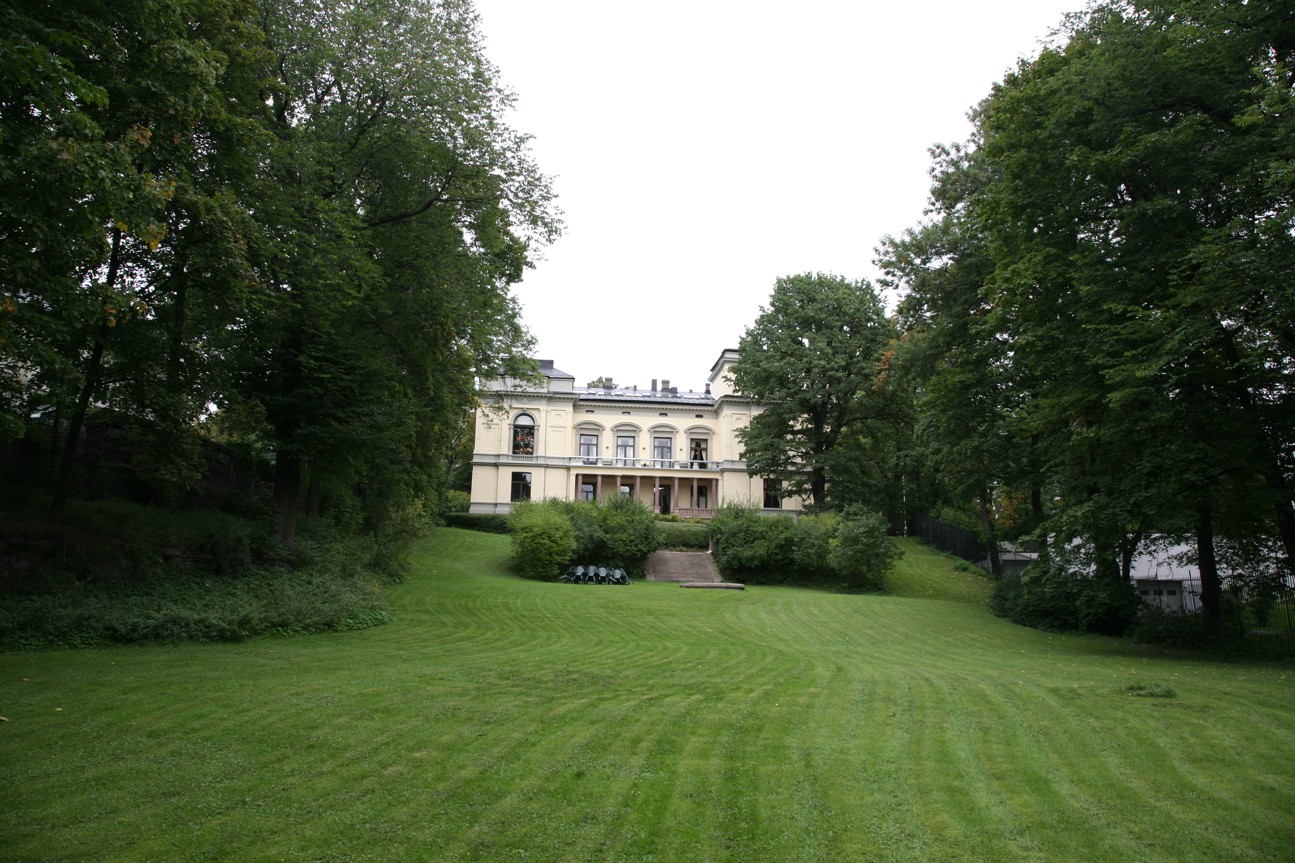 Det Norske Videnskaps-Akademi in Drammensveien 78 in Oslo